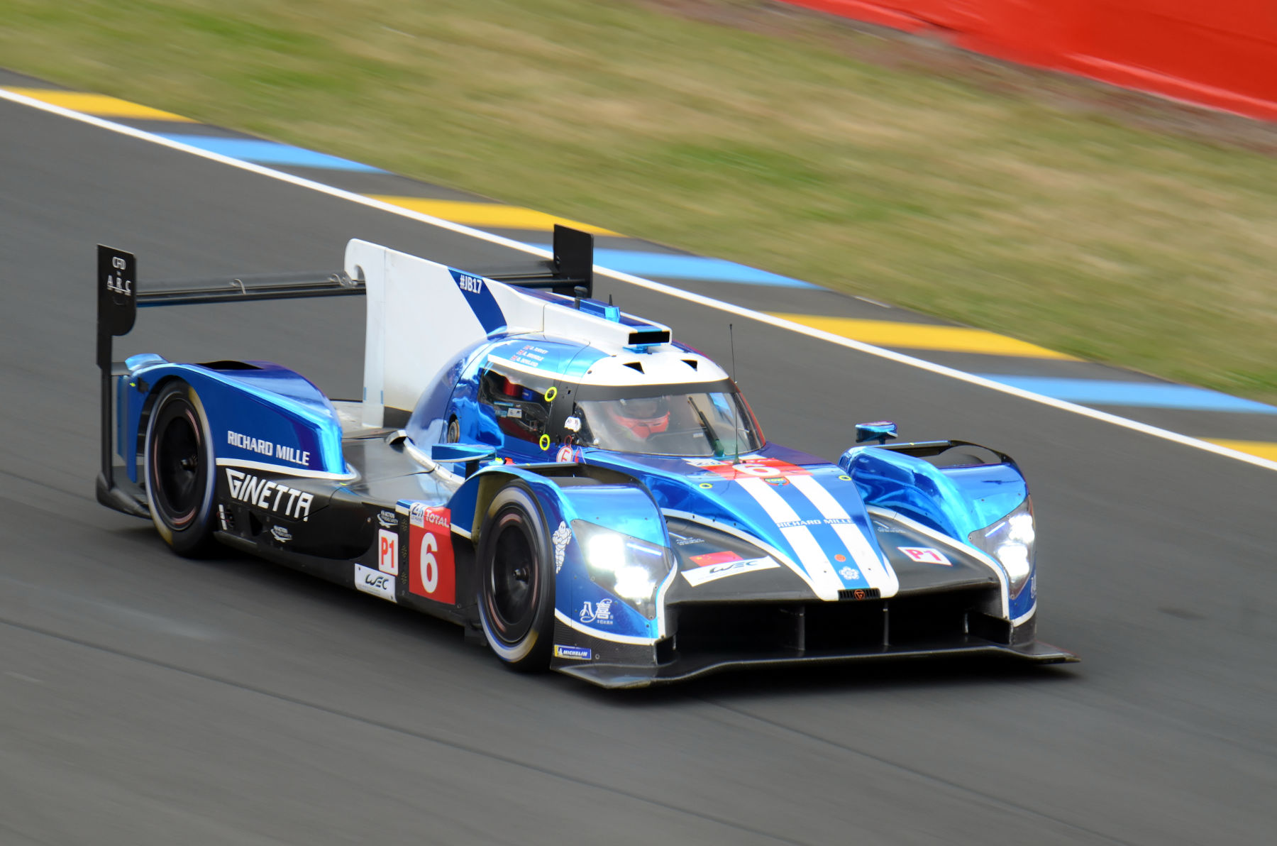 La Ginetta G60-LT-P1- Mecachrome de l'écurie CEFC Manor TRS Racing pilotée par Oliver Rowland, Alex Brundle et Oliver Turvey lors de la journée test des 24 Heures du Mans 2018